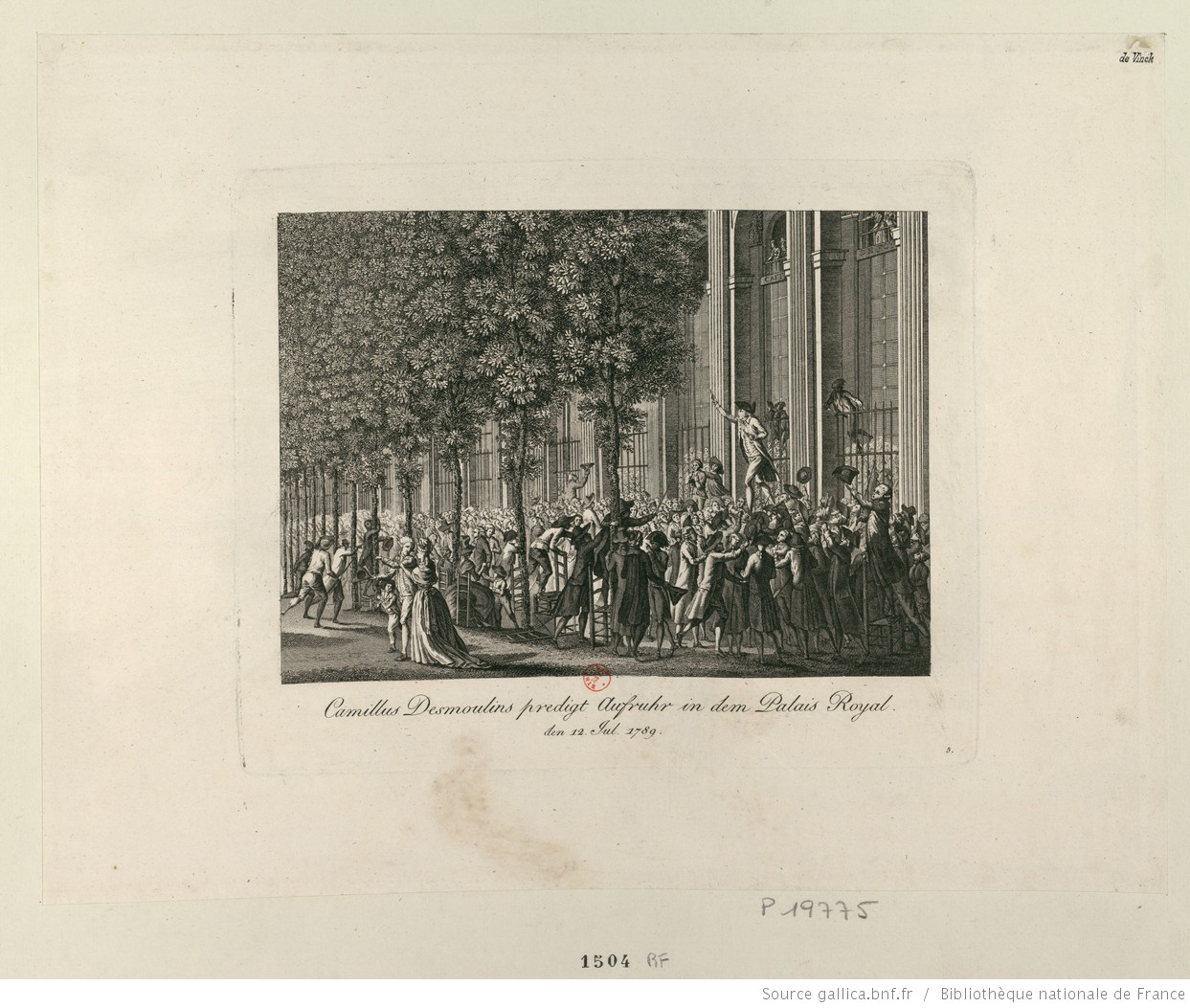 Camillus Desmoulins predigt Aufruhr in dem Palais Royal : den 12 Jul. 1789, estampe publiée en Allemagne, s.n., entre 1794 et 1820. Autre titre : Première motion du Palais-Royal, 12 juillet 1789, propriété de la commune de Senlis ; musée d'Art et d'Archéologie. Joconde, Portail des collections des musées de France.